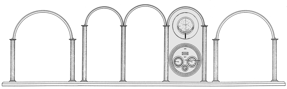 Himmelsglobus und Kalender der Astronomischen Uhr von Hans Lang, Essen, 1982-1986 (Deutsches Uhrenmuseum, Inv. 1995-030)